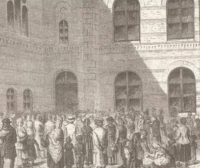 Avskedspredikan i Göteborg 1869, samtida tidningsbild.